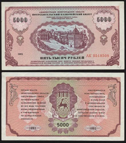 Нємцовки